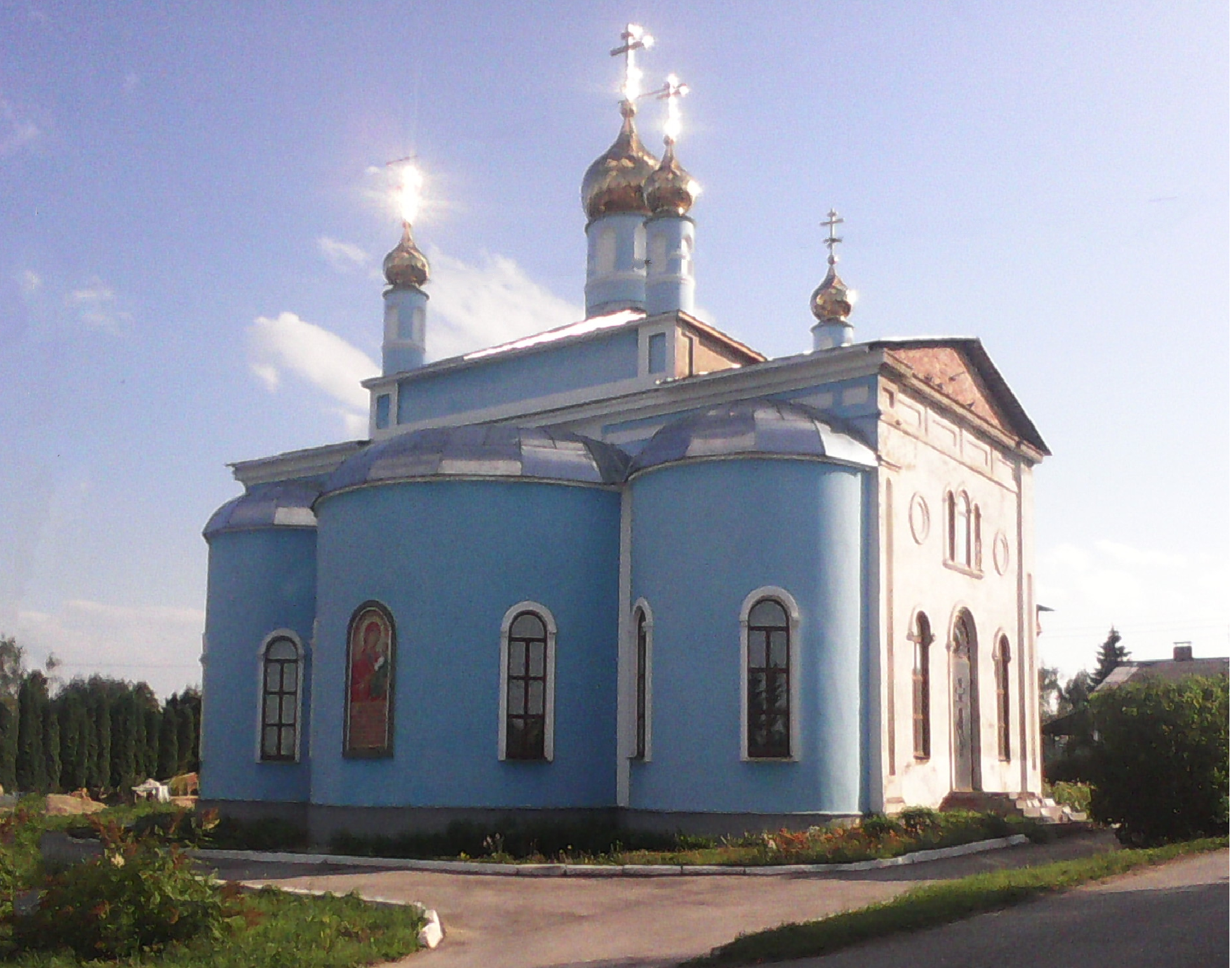 Храм в Тёплом